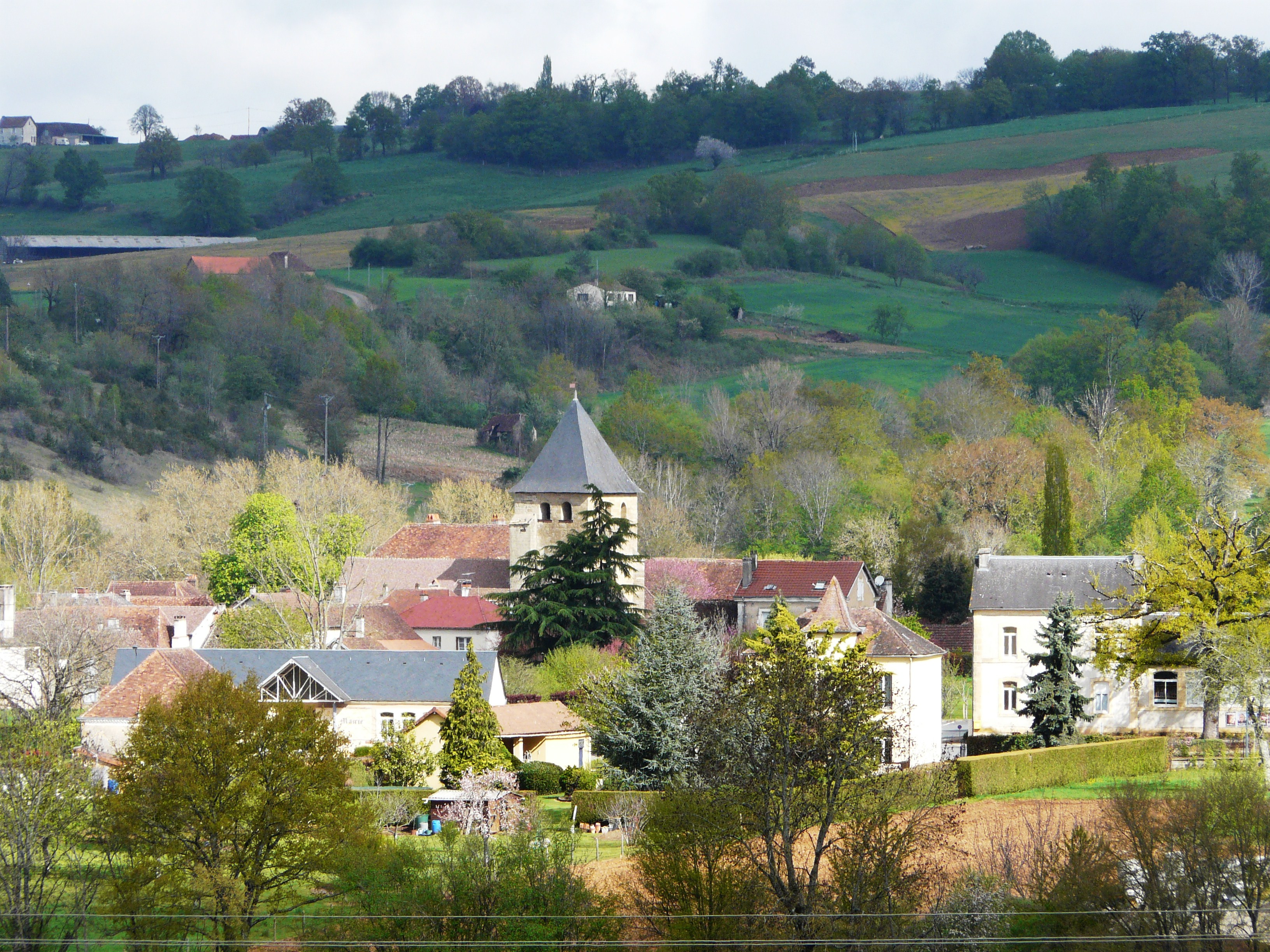 Le village de Saint-Médard-d'Excideuil, Dordogne, France.